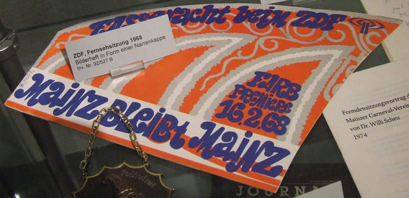 Bilderheft in Form einer Narrenkappe, Fernsehsitzung: Mainz bleibt Mainz, Fassenacht beim ZDF, Farb-Premiere 16. Februar 1968.